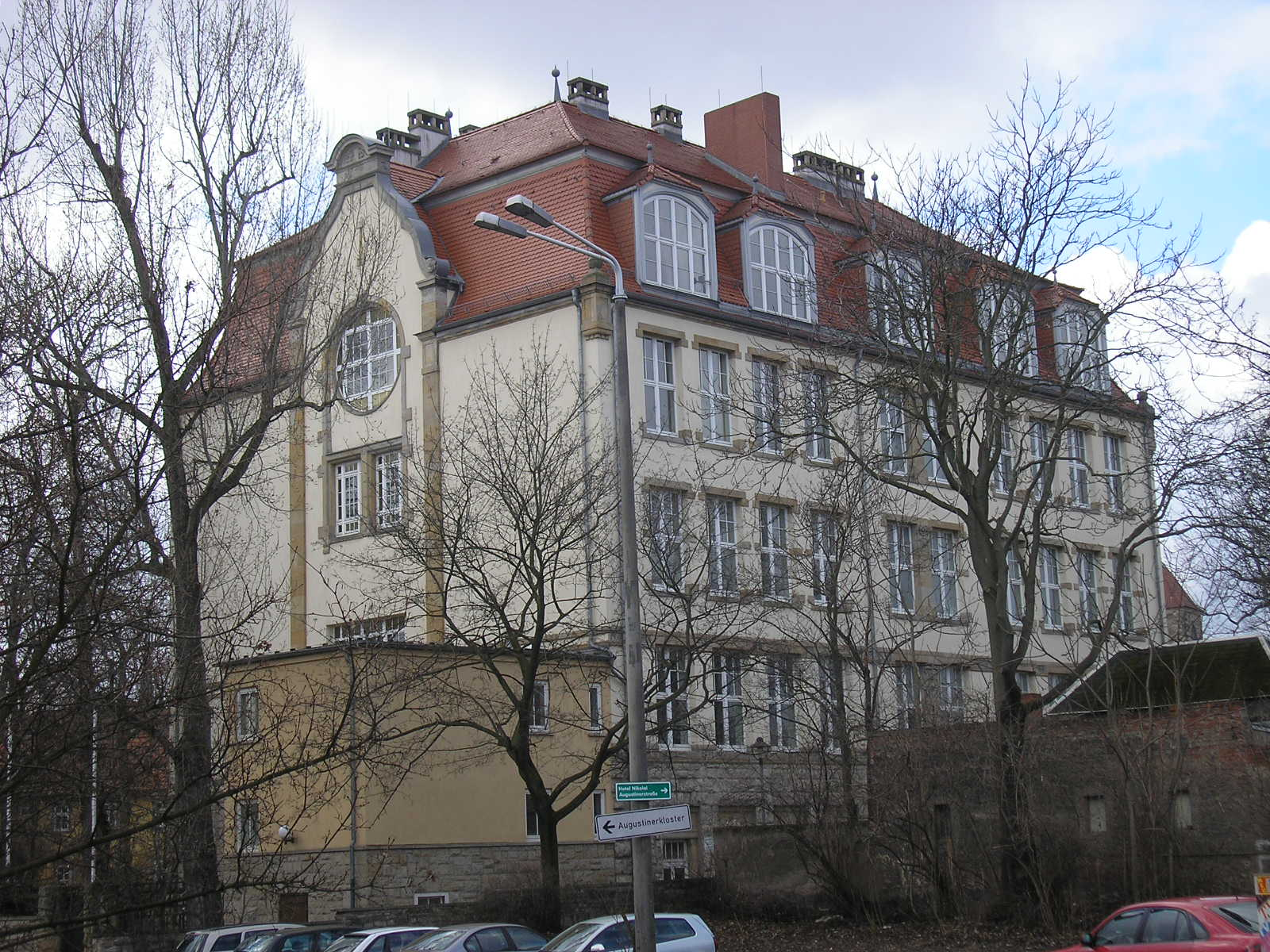 Das Gebäude der ehemaligen Kunstgewerbeschule Erfurt (heute Fachbereich Kunst der Universität Erfurt), genannt Hügelschule, in Erfurt (Thüringen).